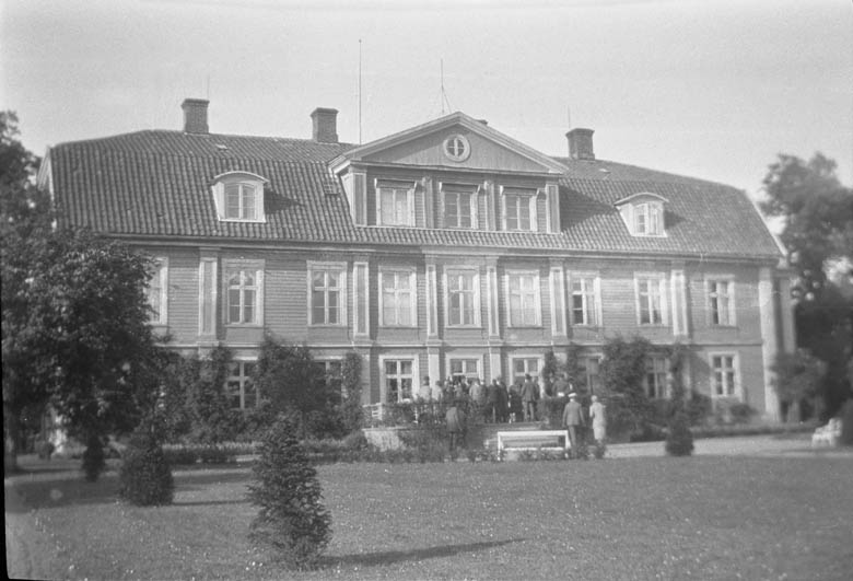 Mannerskantzka huset sett från trädgården Motiv: Mannerskantzka huset, Värnanäs Kategori: HerrgårdMannerskantzka huset sett från trädgården.